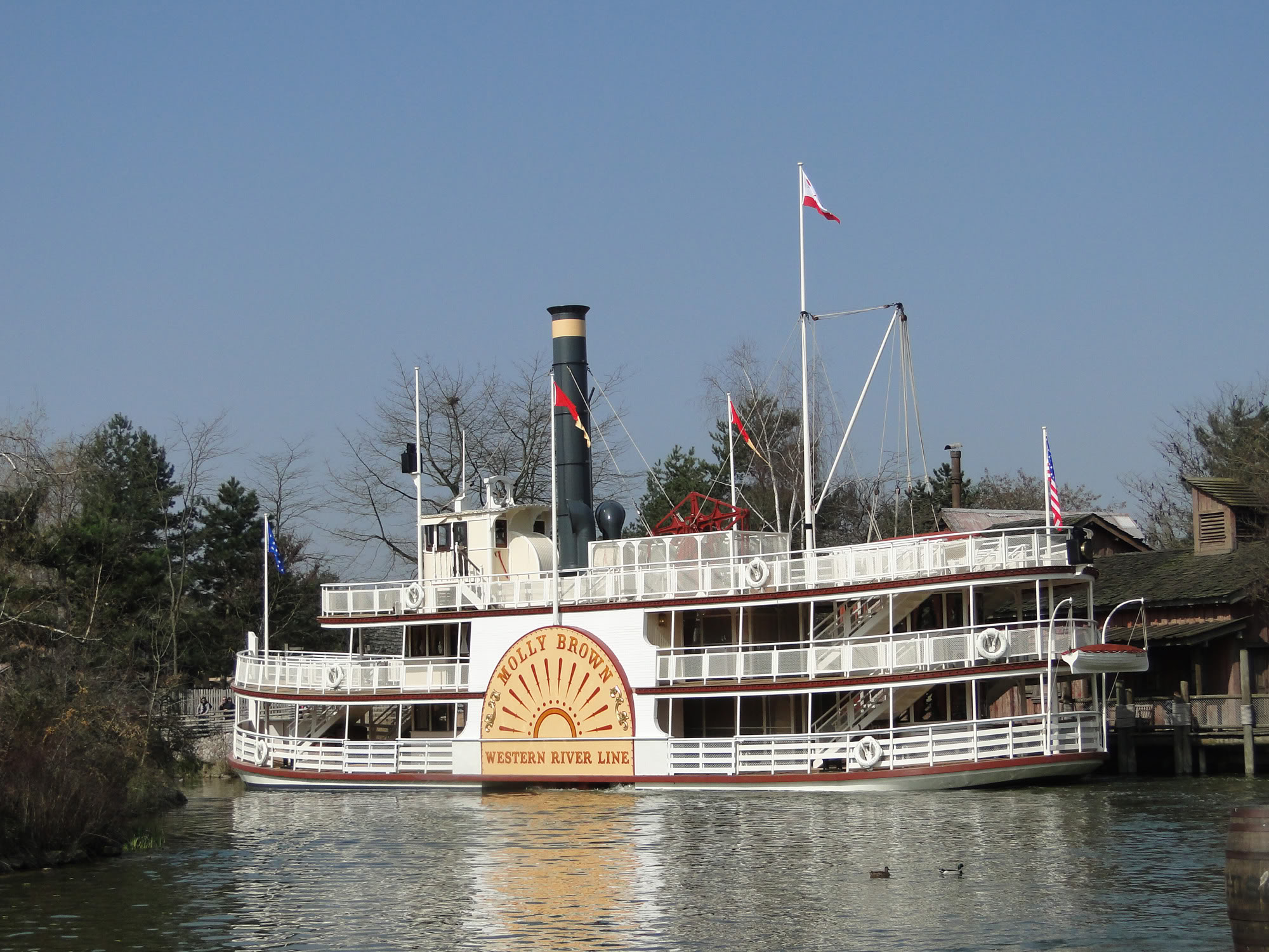 Tons rouge